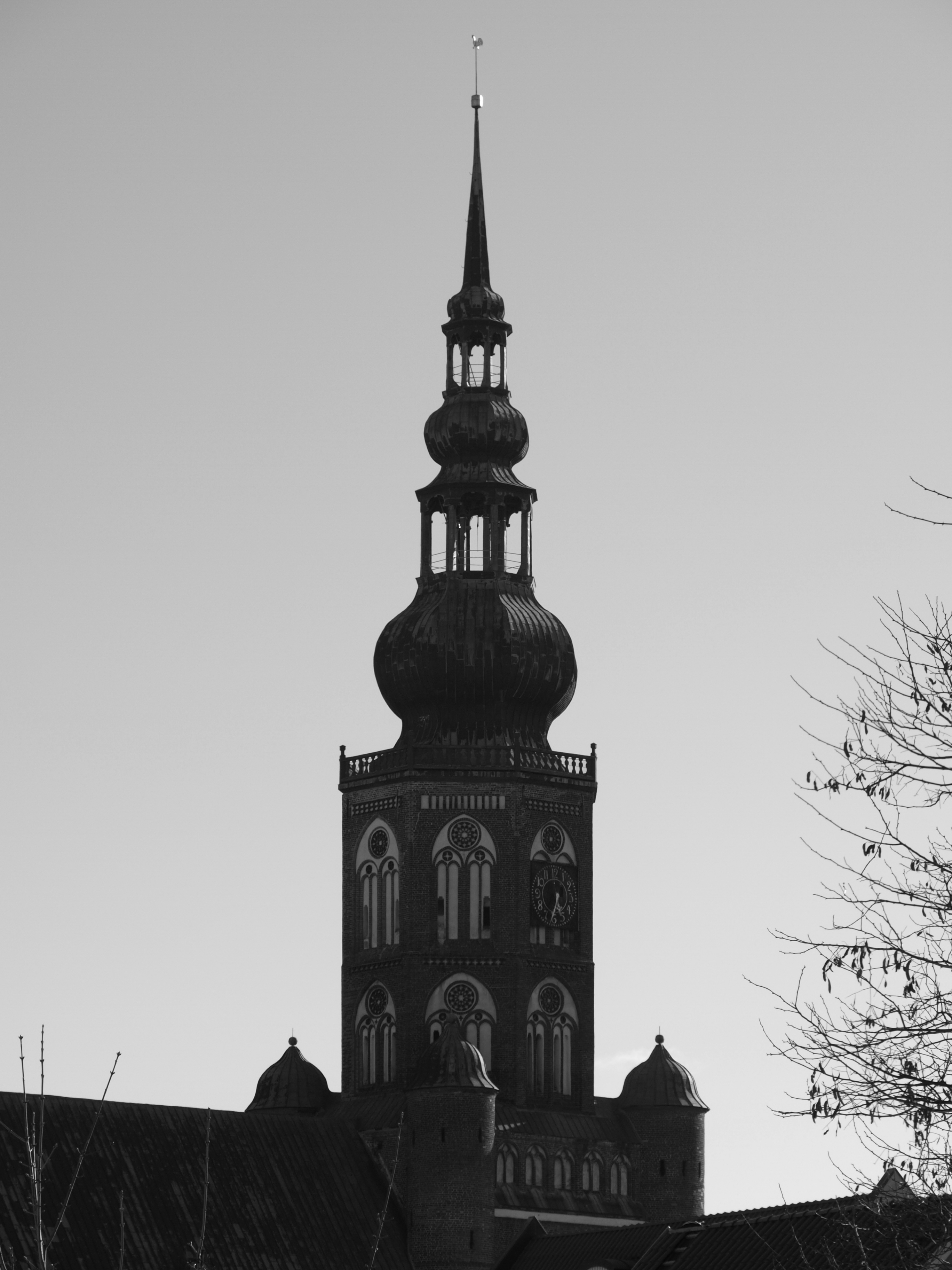 Der Greifswalder Dom St. Nikolai, dem Schutzheiligen der Seefahrer und Kaufleute geweiht, ist ein gotischer Backsteinbau, Wahrzeichen der Stadt Greifswald und liegt im westlichen Zentrum der Stadt. Der Greifswalder Dom war die Haupt- bzw. Bischofskirche der Pommerschen Evangelischen Kirche.